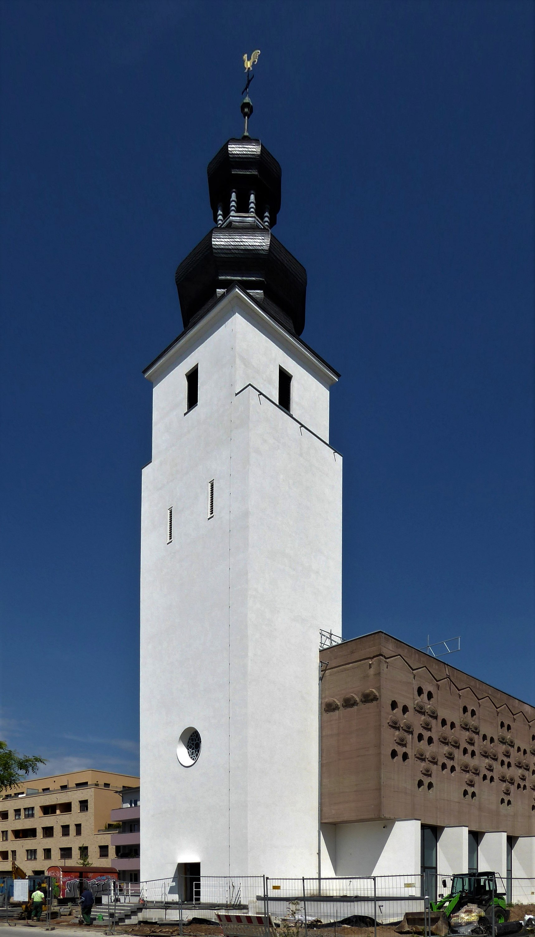 Zur Heiligen Familie (Waisenhauskirche), Köln-Sülz